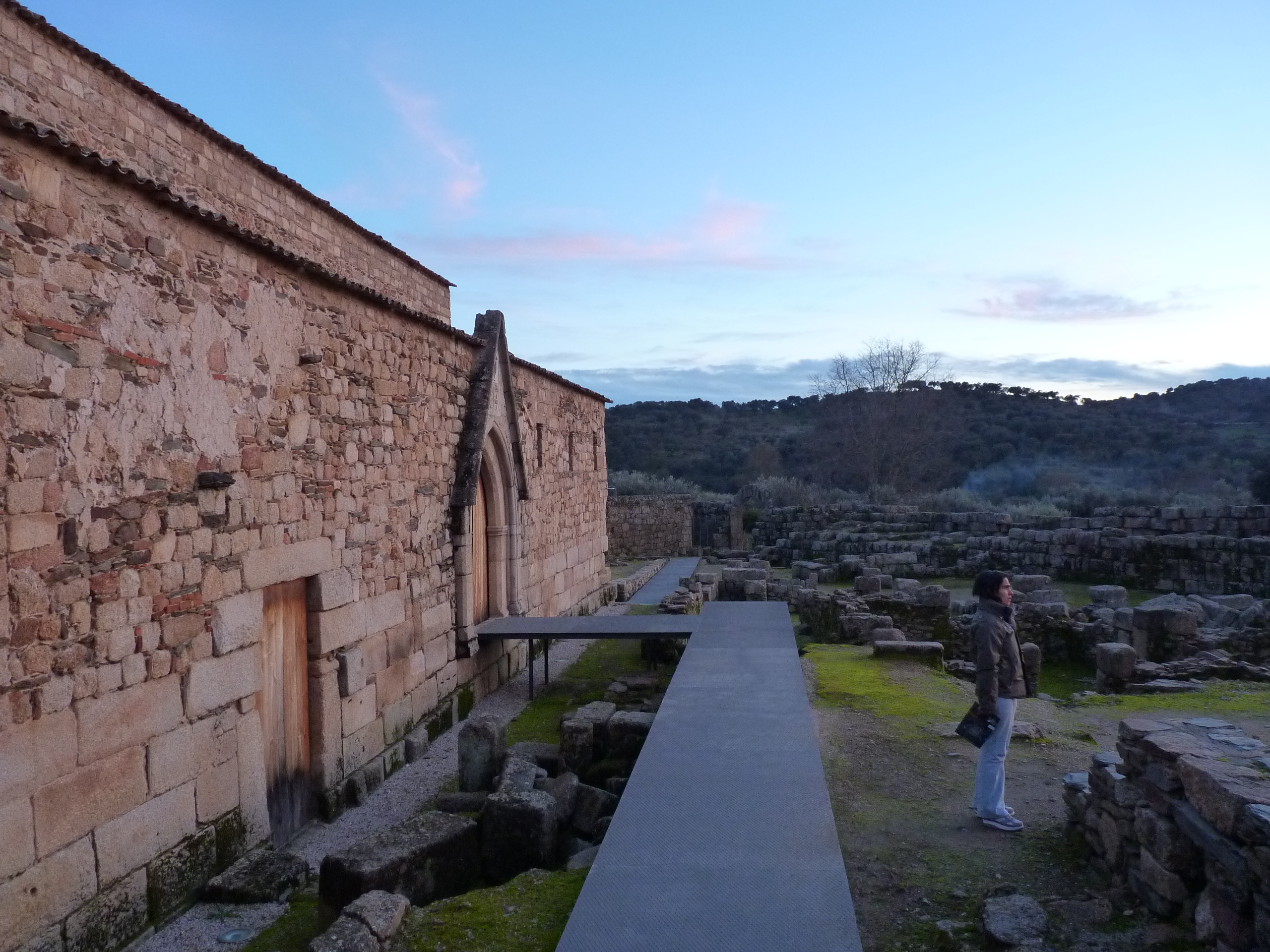 Conjunto arquitectónico e arqueológico de Idanha-a-Velha Inclui a denominada Catedral de Idanha-a-Velha This file was uploaded for Wiki Loves Monuments in Portugal with the unique identifier 70554.